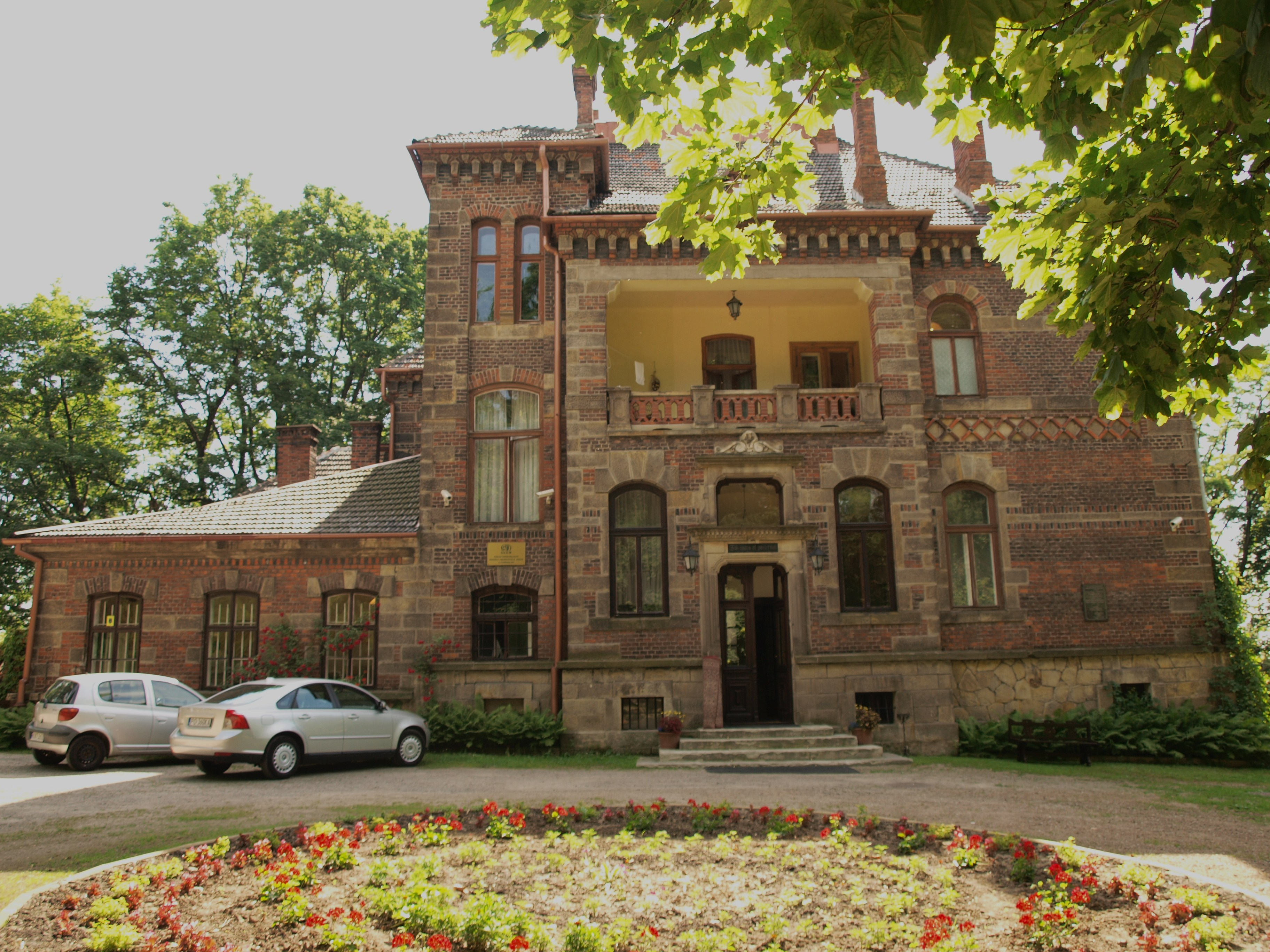 zespół dworski: dwór, obora, piwniczka (serownik), park z fontanną z figurą Grodkowice, Kłaj